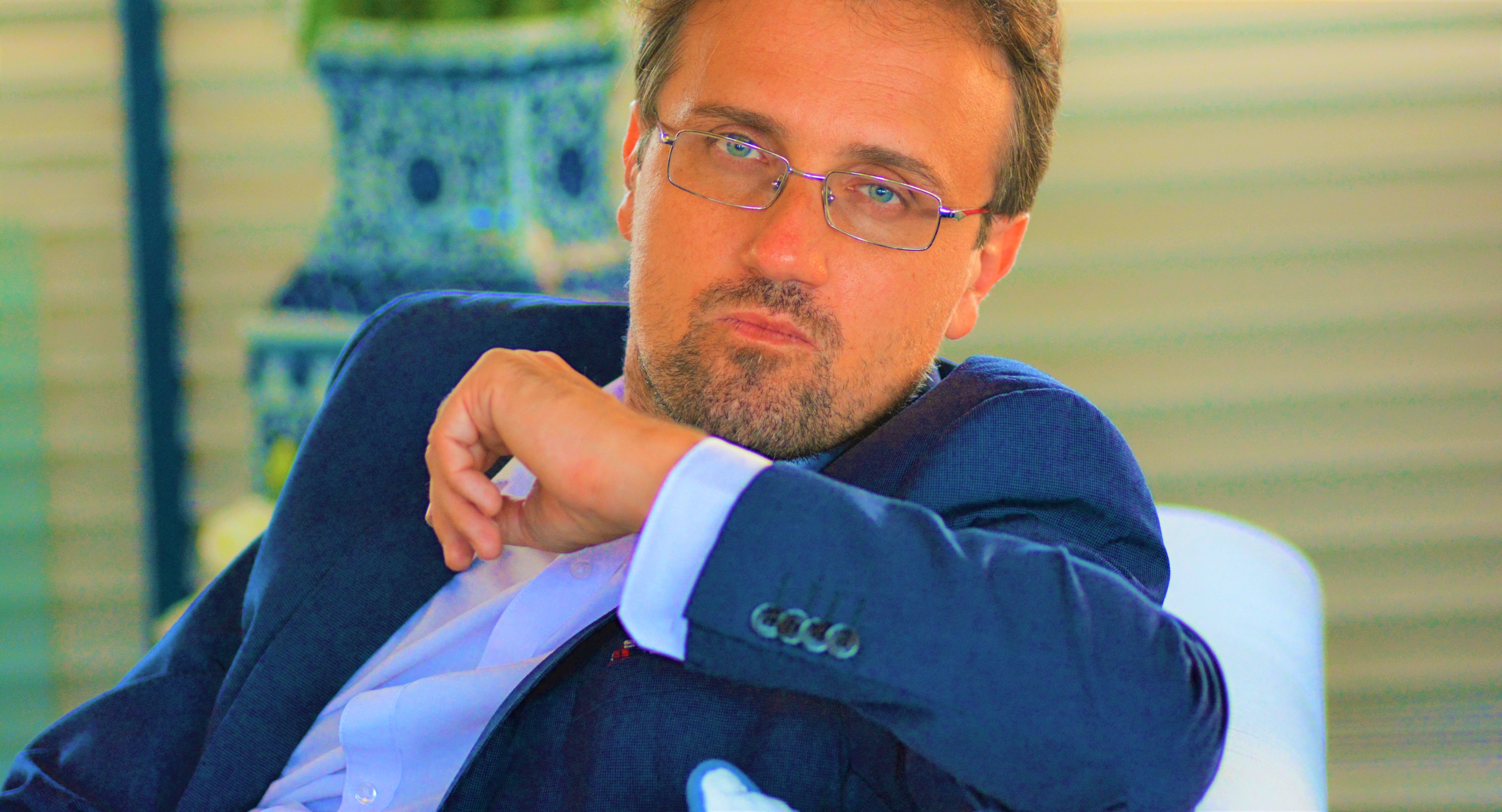 Luca Nannipieri